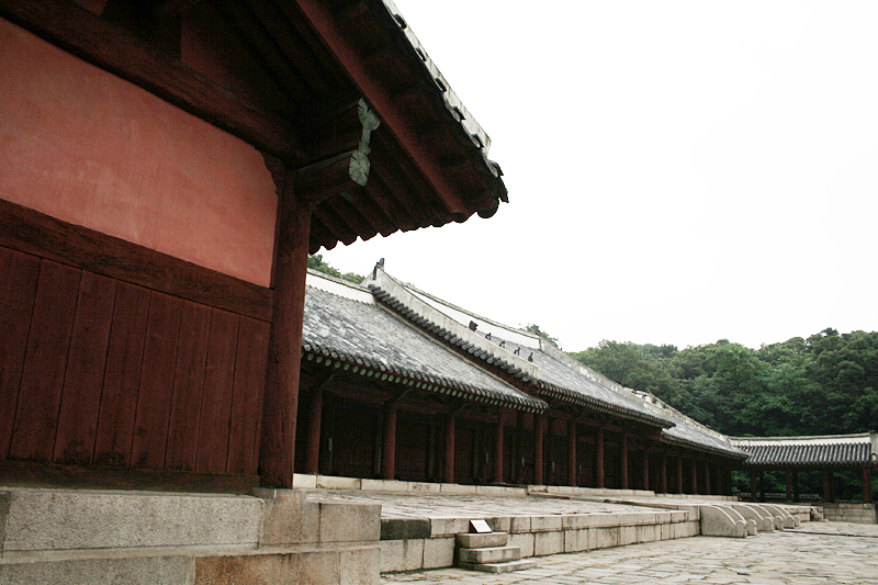 Yeongnyeongjeon Hall